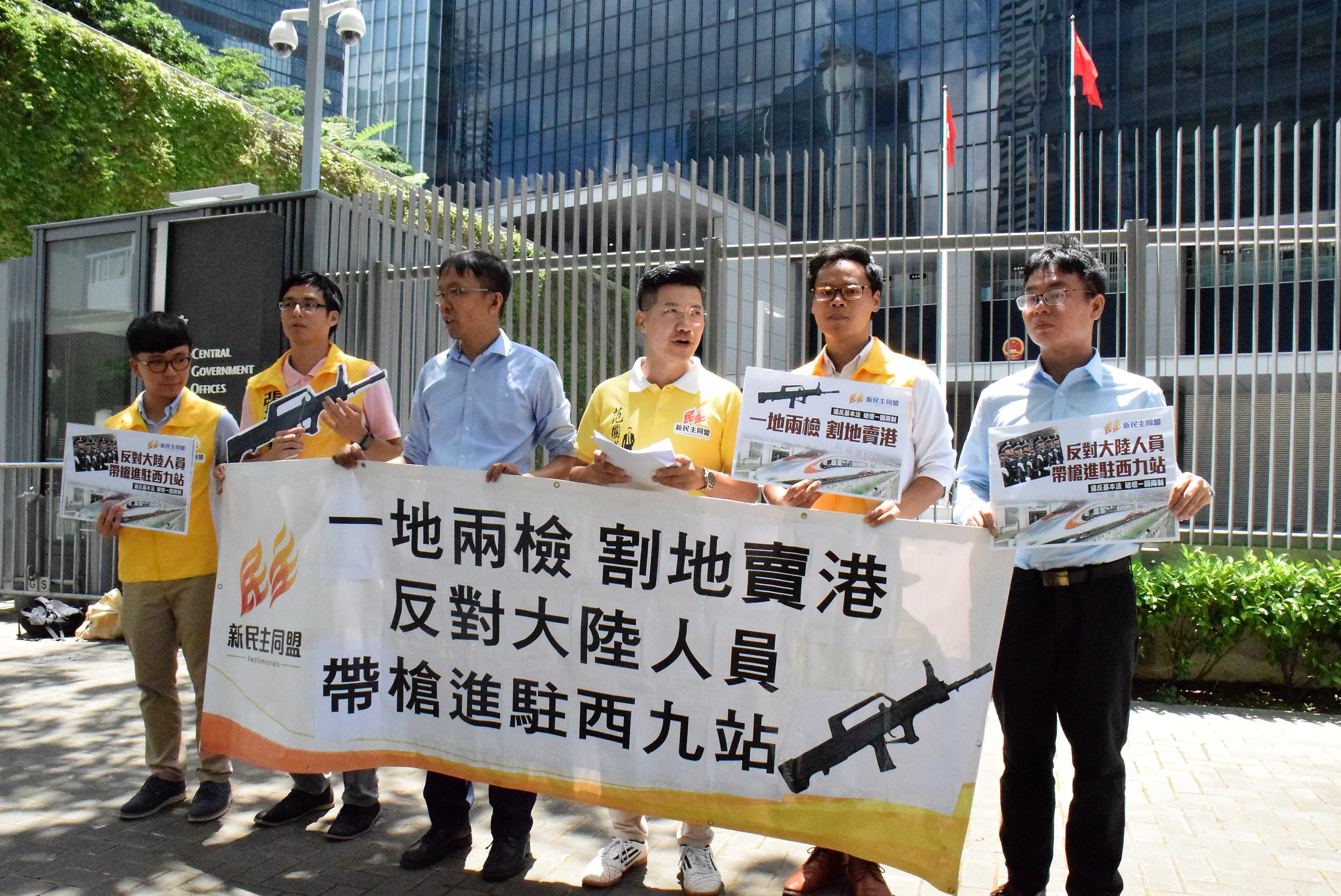 香港新民主同盟抗議港府計劃在西九高鐵總站實行一地兩檢。